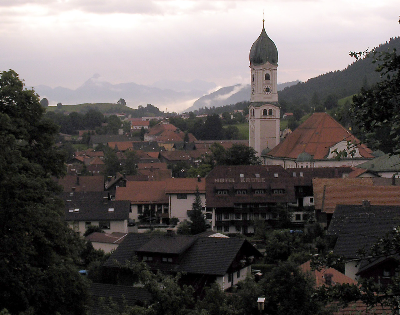 Nesslwang im Allgäu